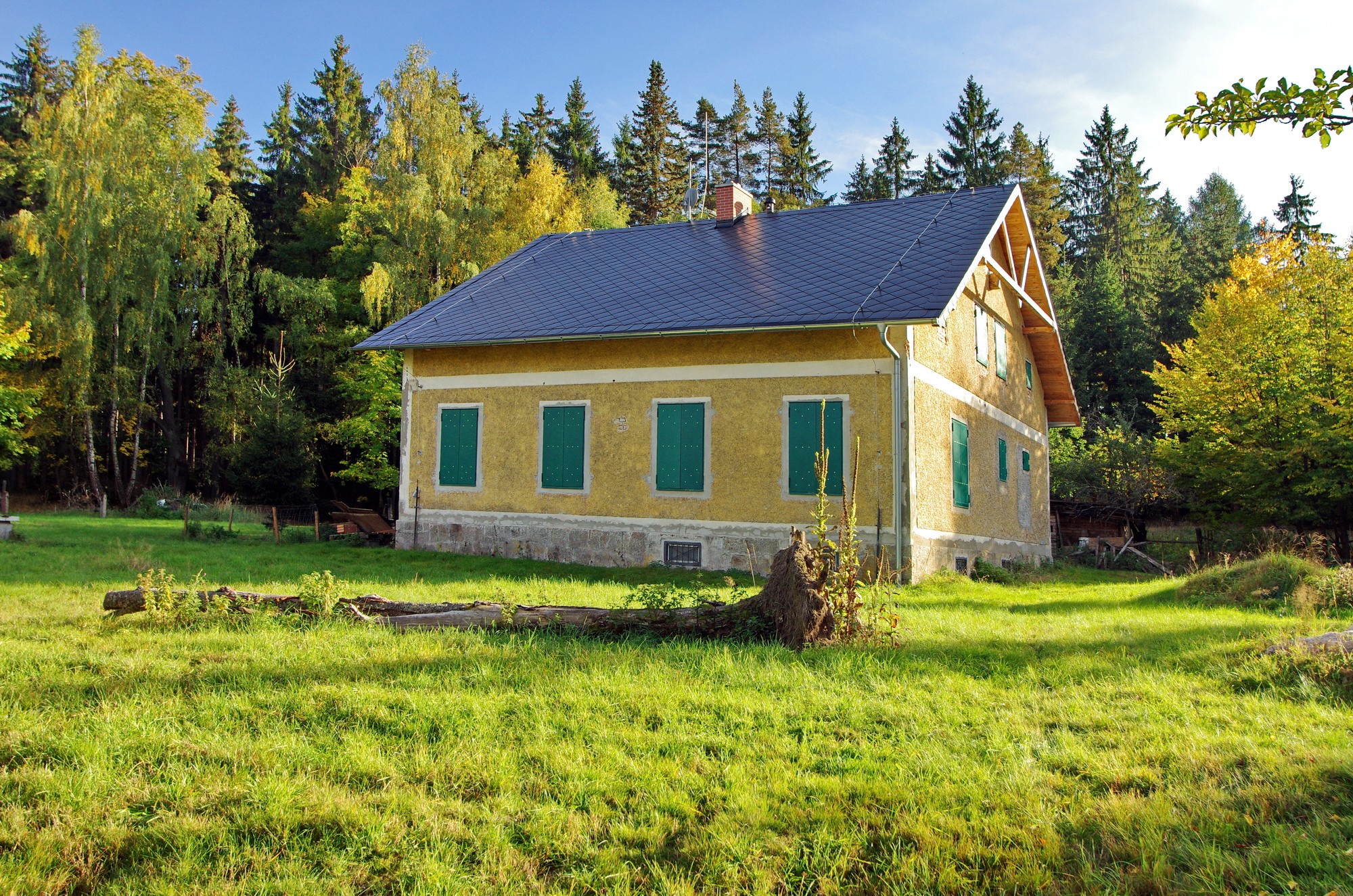 Třídomí, zaniklá osada ve Slavkovském lese, dolní hájenka, okres Sokolov